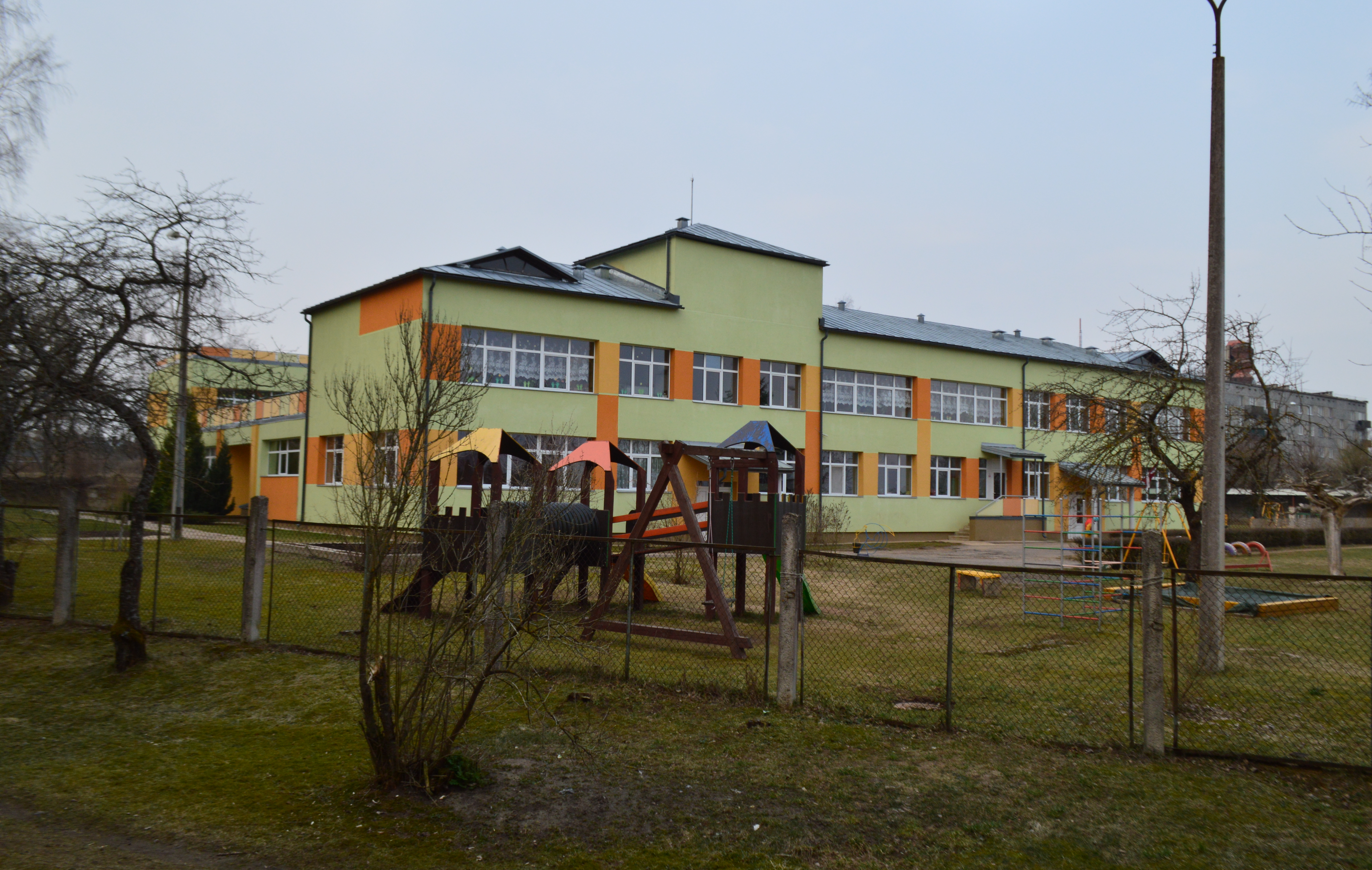 Viesītes novada pašvaldības pirmsskolas izglītības iestāde “Zīlīte”